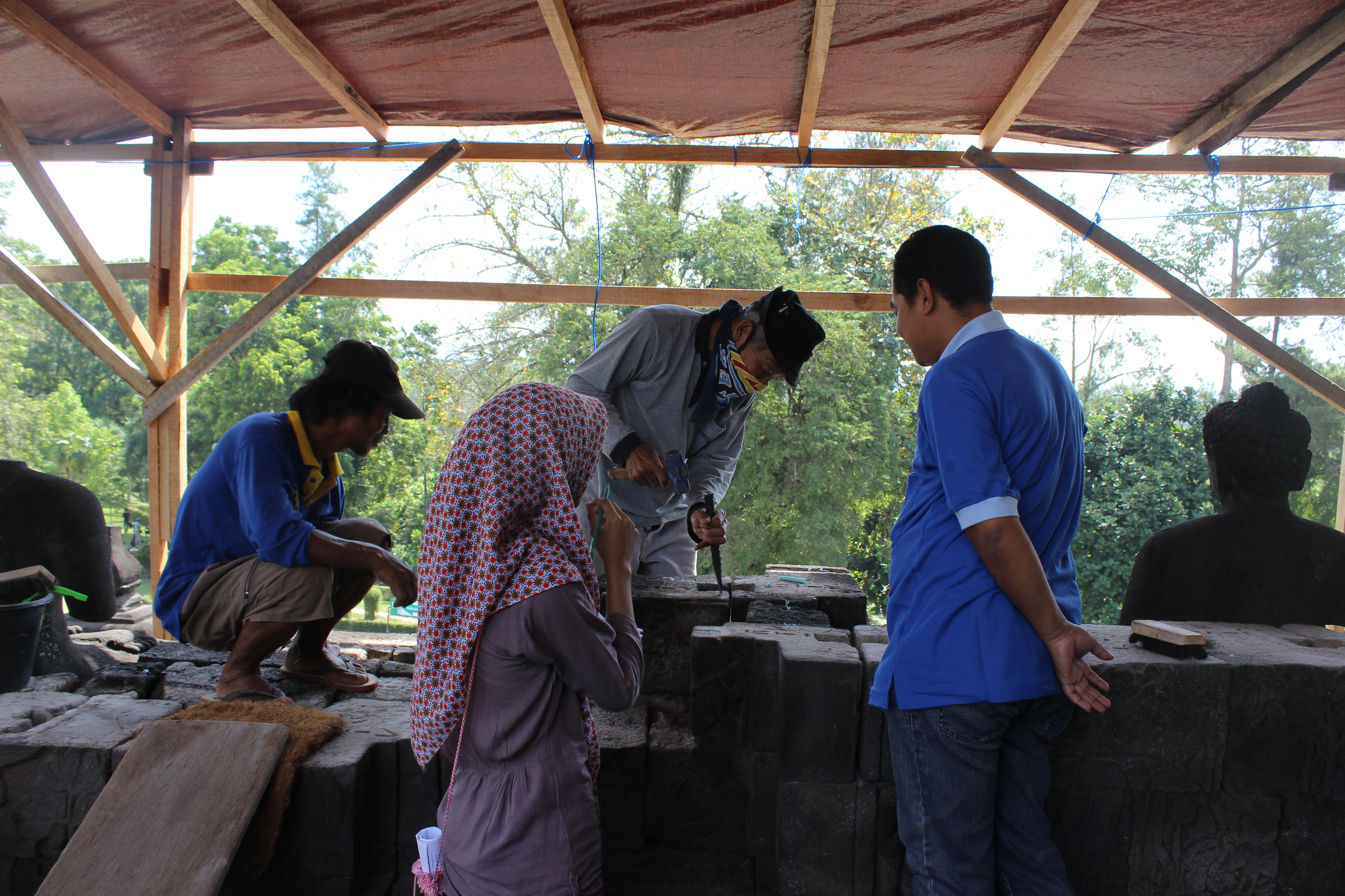 Basa Jawa: Gambar niki uga kulo pundut wektu ningali kegiatan pamugaran Candhi Barabudhur. Ing ngajeng kulo wonten salah sijining petugas pemugaran kang sampun 15 taun ngrewangi petugas-petugas enom.